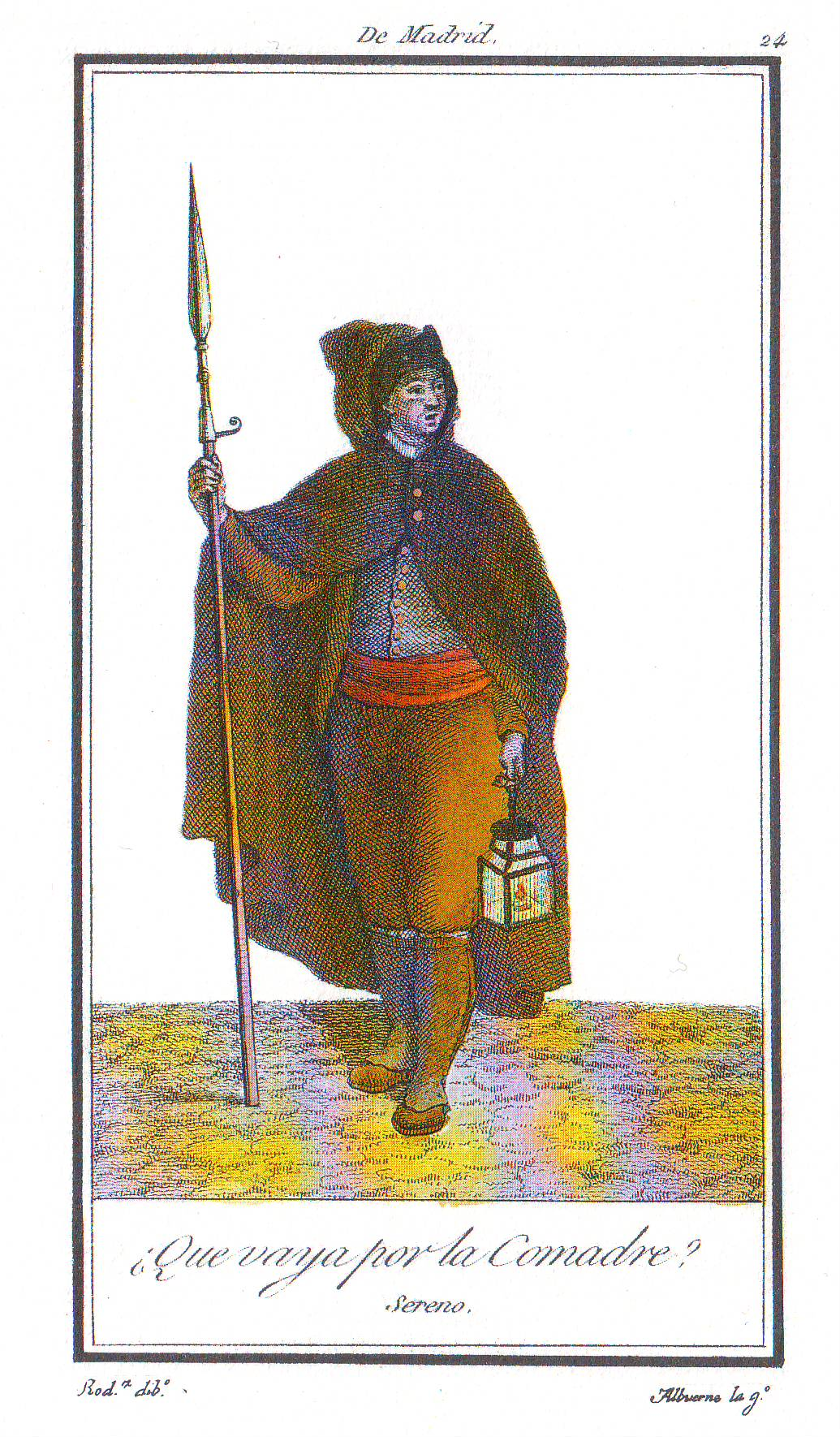 Grabado “¿Que vaya por la Comadre? Sereno.” (1802) en el catálogo de 'Trajes de España', dibujado por Antonio Rodríguez. Reproducción facsimil de treinta y ocho estampas, más catorce variantes, de los Trajes de Madrid. Todas iluminadas. Introducción de Juan Carrete Parrondo, Madrid (1989).